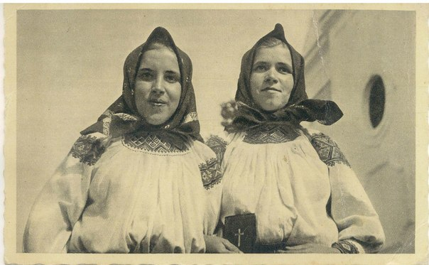 Дівчата з Воловця[1] ↑